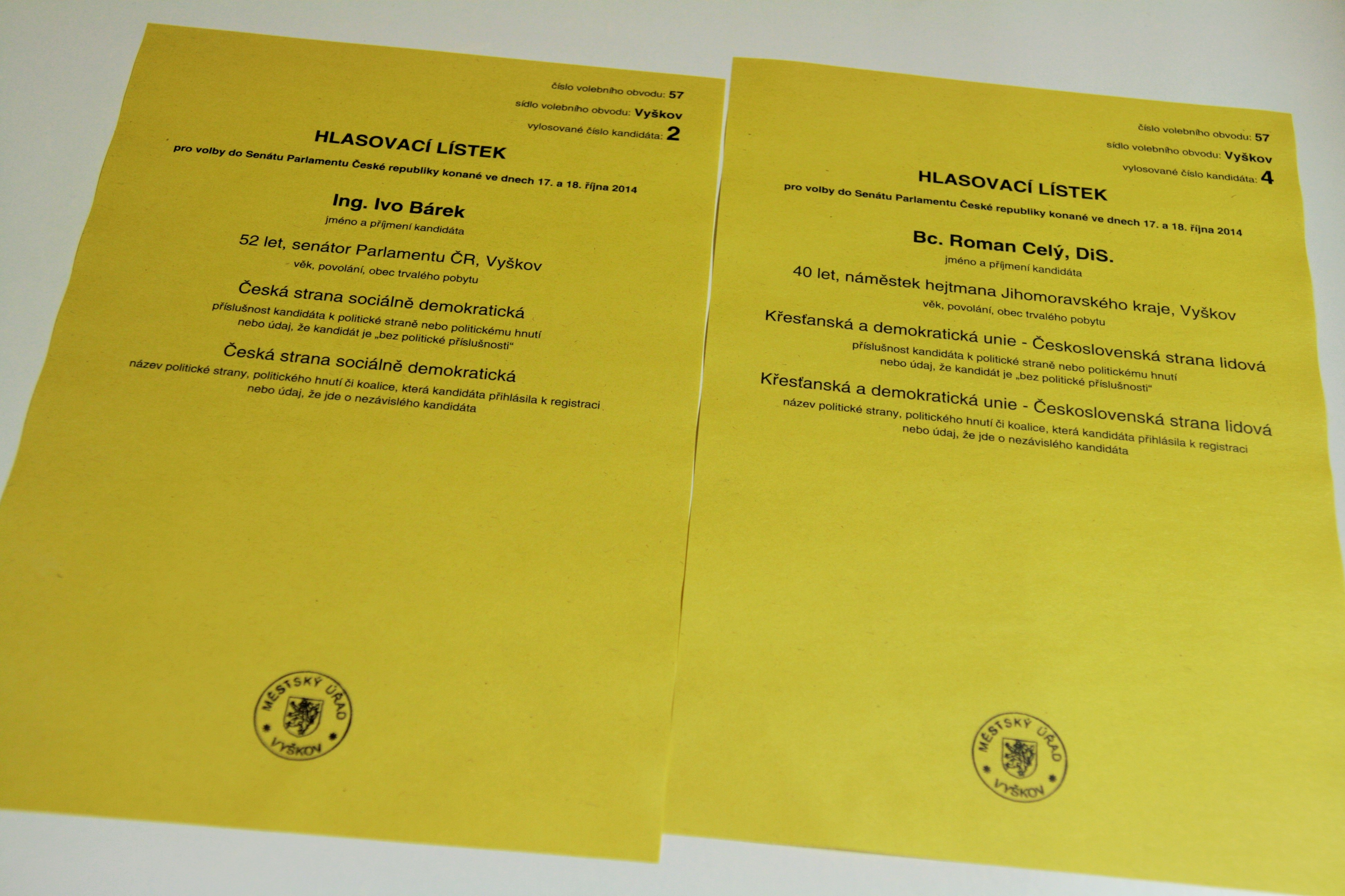 Druhé kolo senátních voleb 2014 ve Slavkově u Brna (volební obvod č. 57 – Vyškov). Volební lístky kandidátů postoupivších z 1. kola, Ivo Bárka (ČSSD) a Romana Celého (KDU-ČSL).